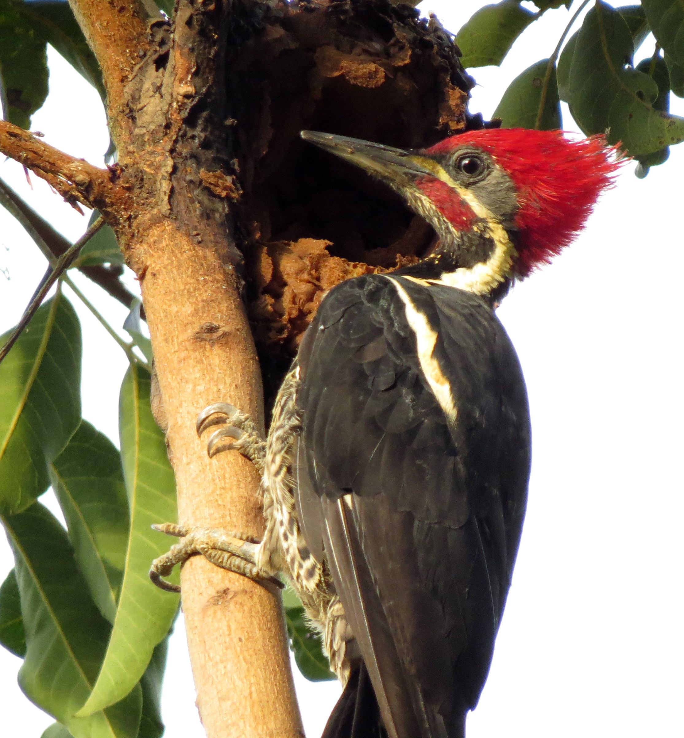 Dryocopus lineatus (Carpintero real), Cajamarca - Cañón del Río Anaime, Colombia